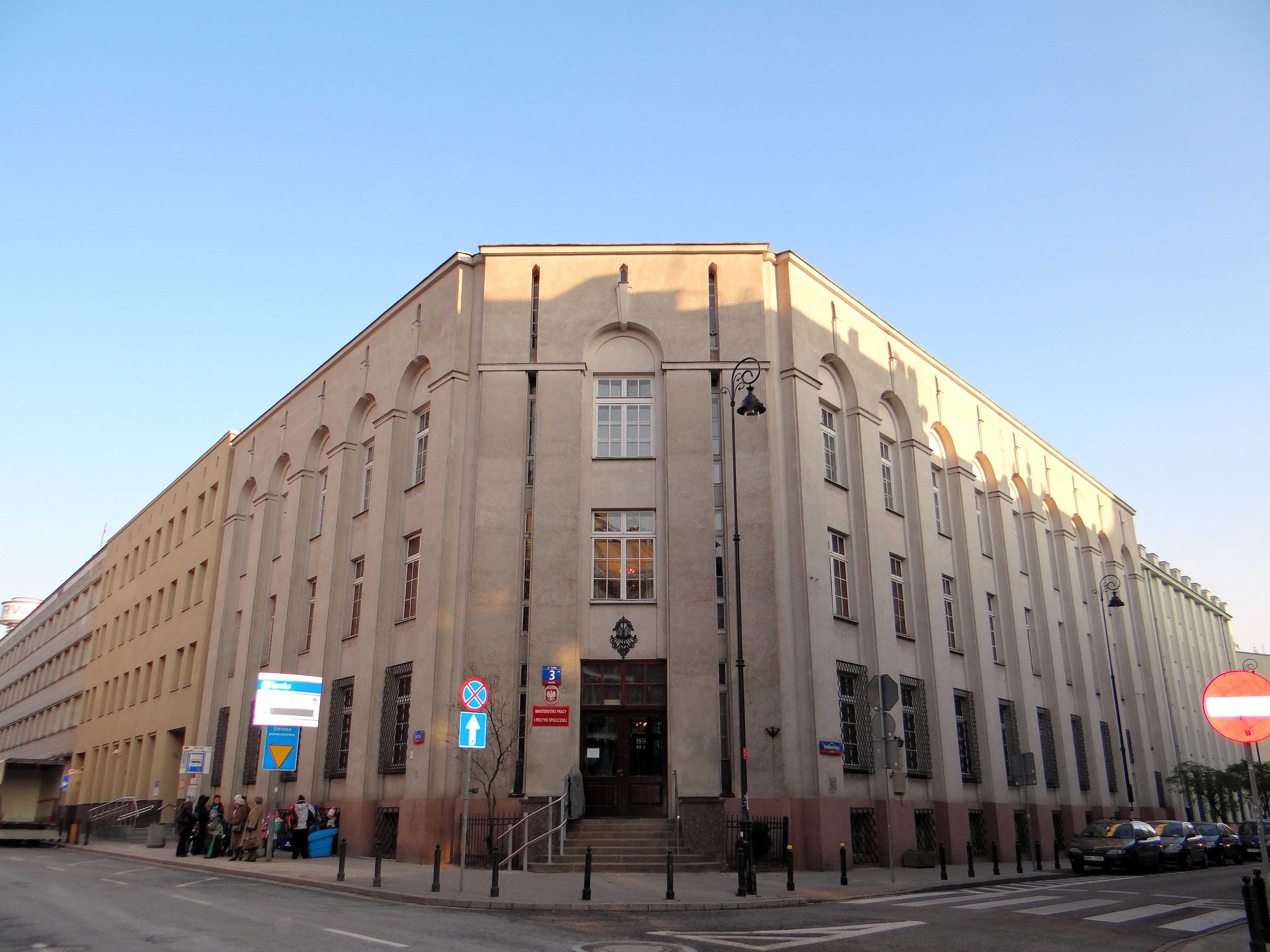 Ministerstwo Pracy i Polityki Społecznej w Warszawie przy ul. Tamka 3